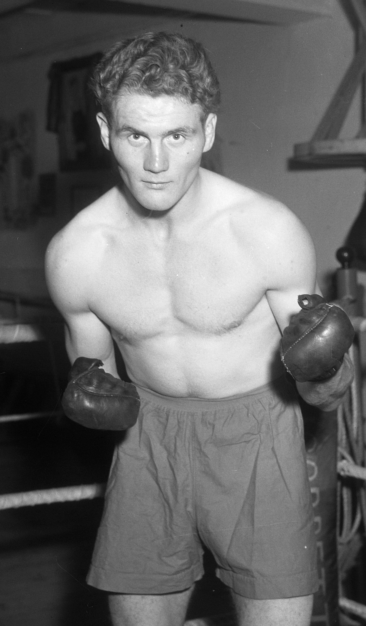 Olympische Spelen boksen Anton Pastor